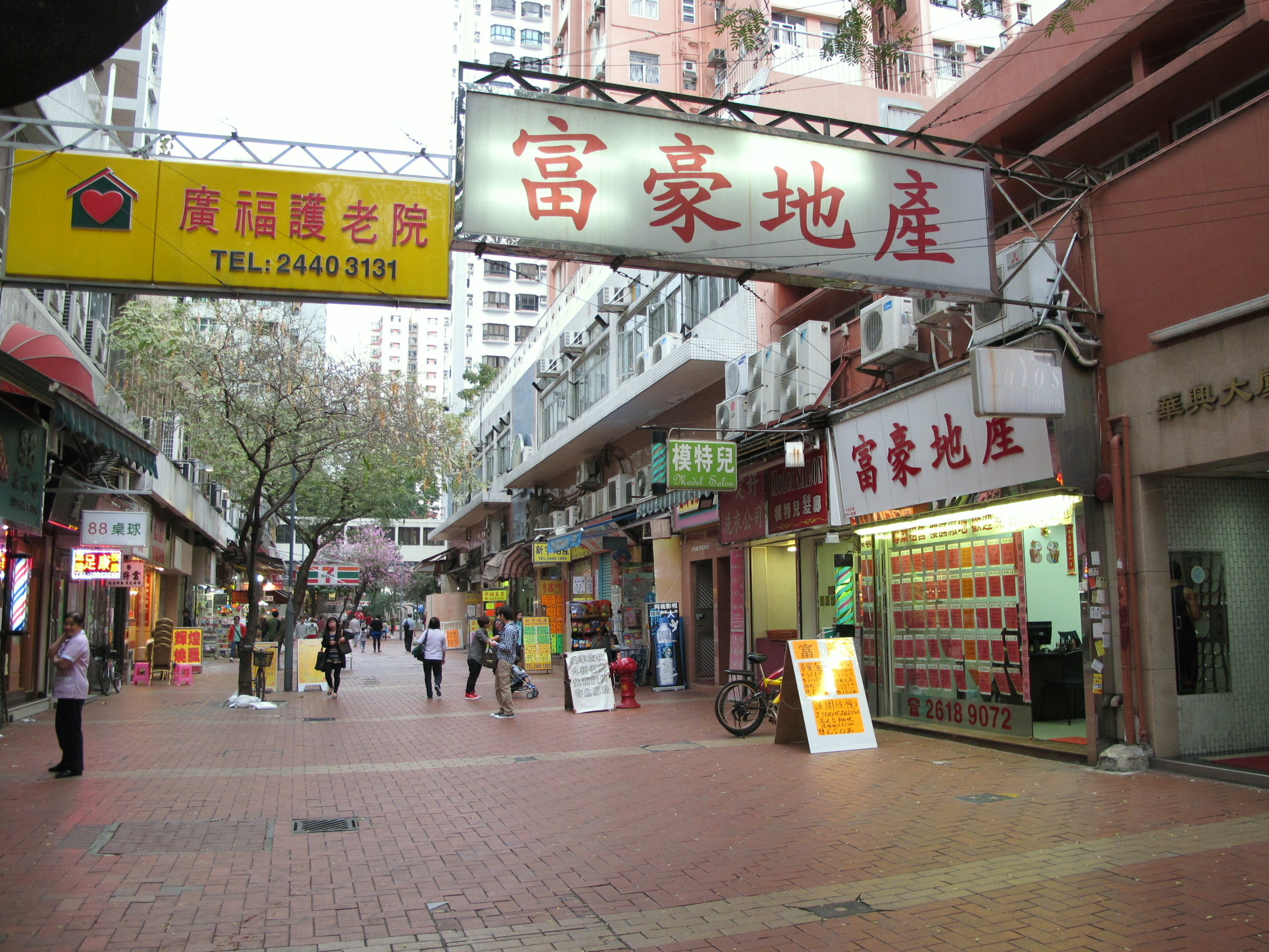 Shops in Hung Kiu